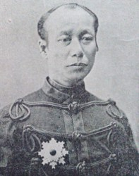 Miyoshi Shigeomi